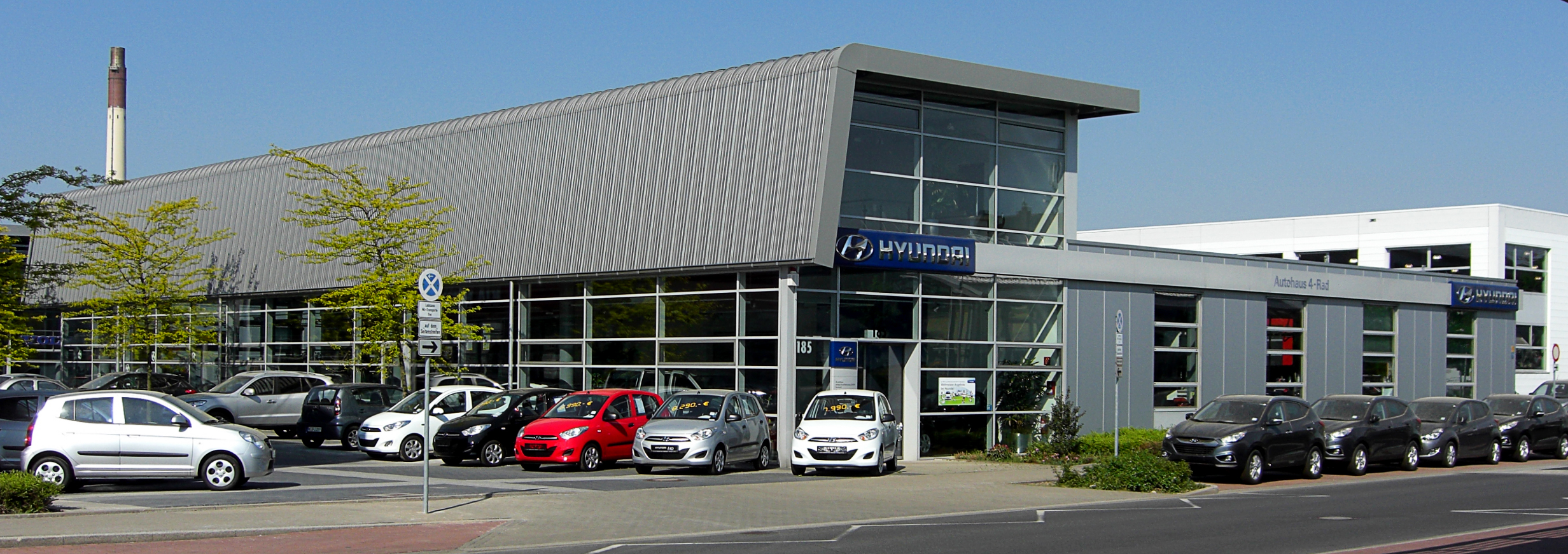 Autohaus 4-Rad (Hyundai) – Automeile Höherweg